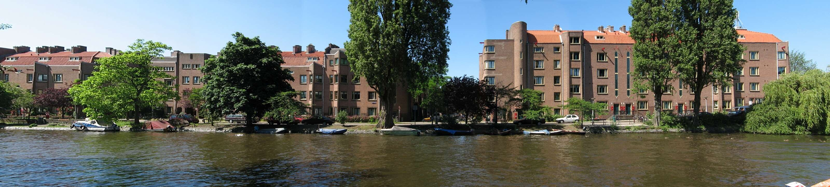 Diamantbuurt zuidzijde (Jozef Israelskade)